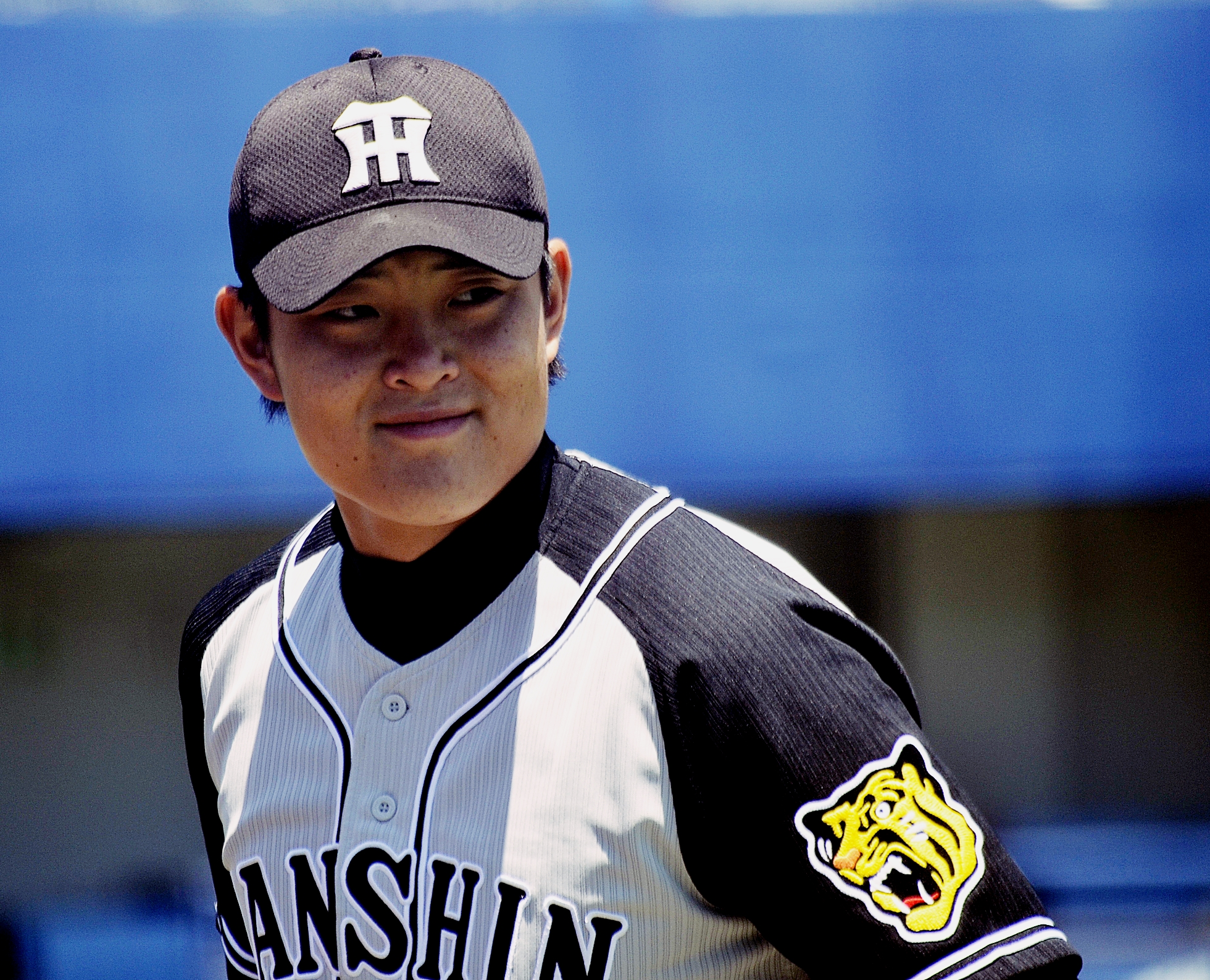 阪神タイガースの望月惇志投手